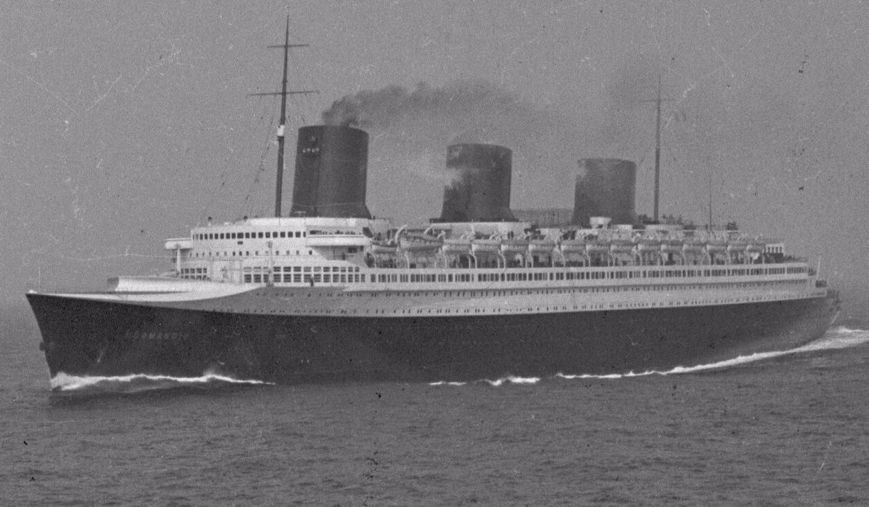 SS Normandie